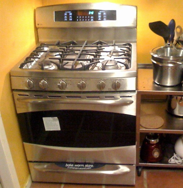 5-flammiger Gasherd, mit zwei übereinanderliegenden Backöfen. Aktuelles Standgerät des US-amerikanischen Herstellers General Electric; in einer in den USA üblichen Ausführung und mit entsprechenden Abmessungen sowie mit Edelstahl-Oberflächen.